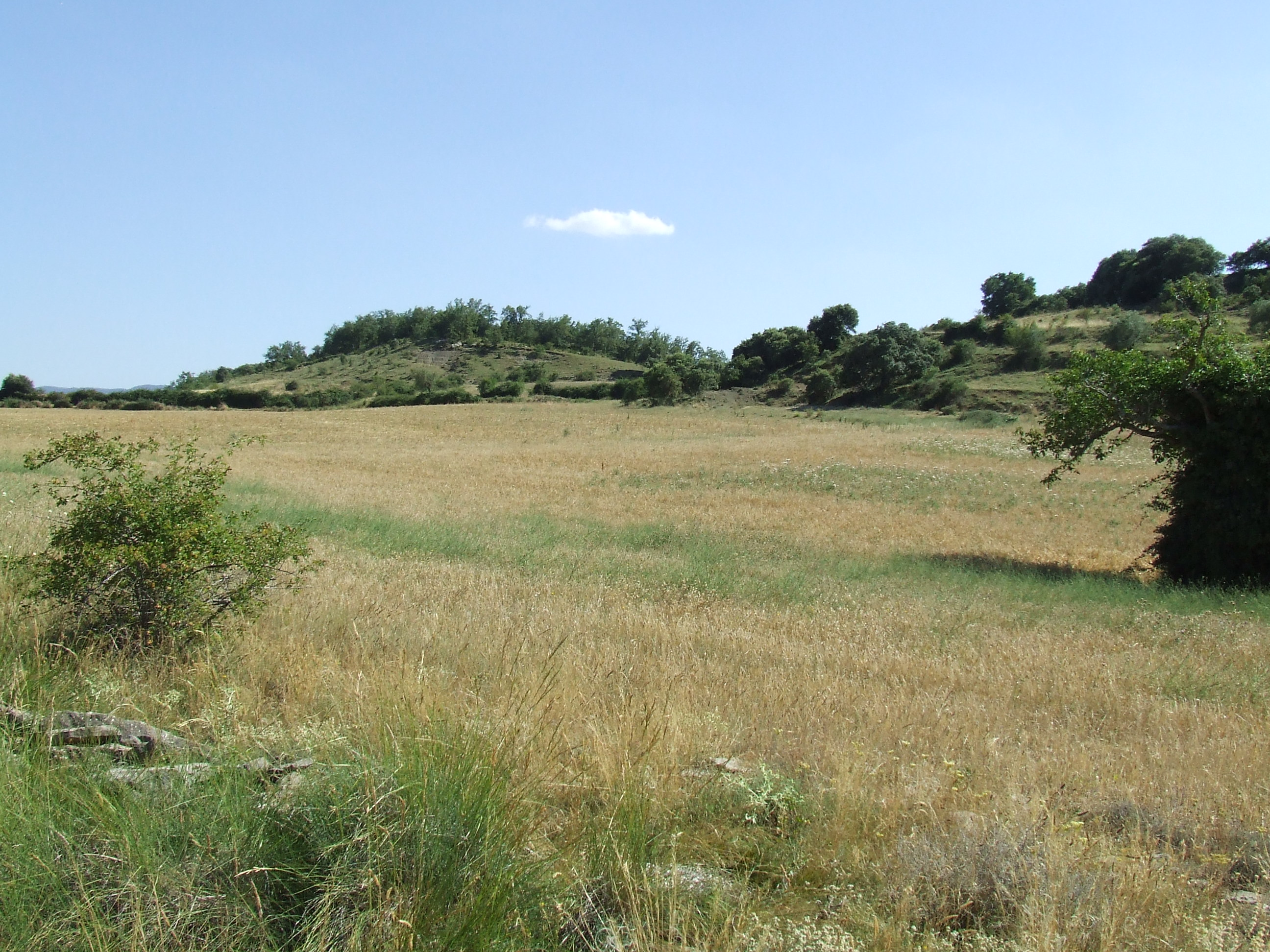 Planell de Sallamana (el Meüll, Mur, Castell de Mur, Pallars Jussà)